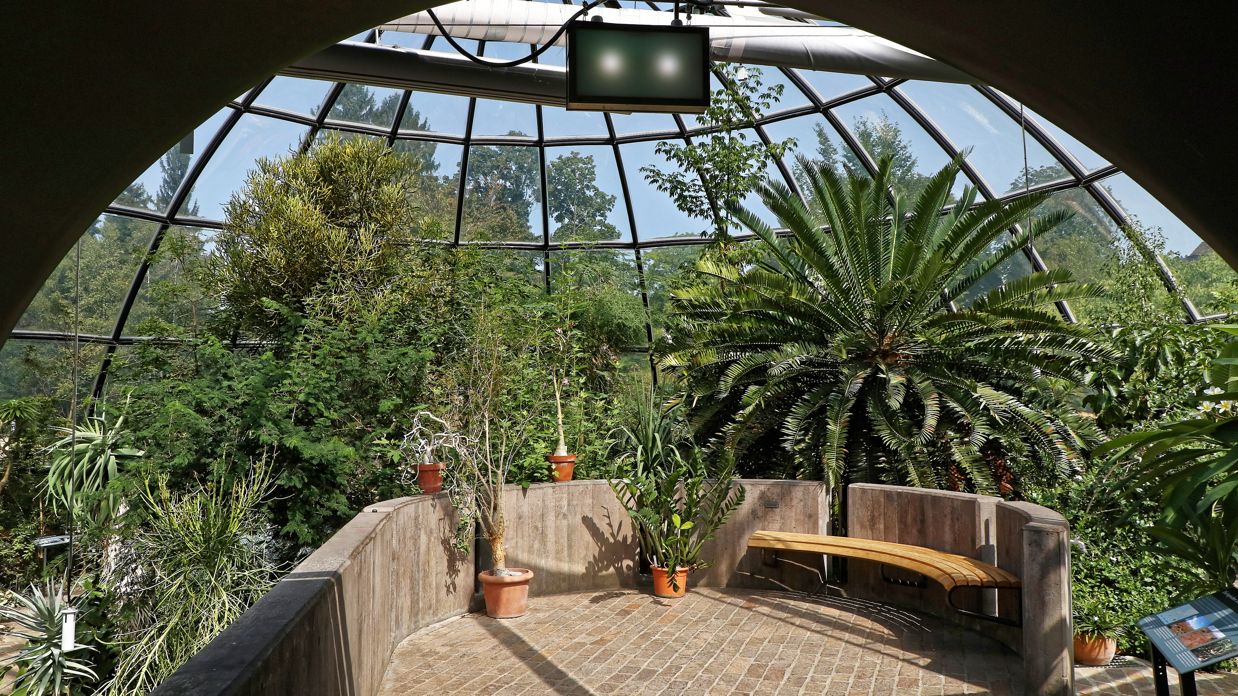 Palmengewächshaus ovn innen